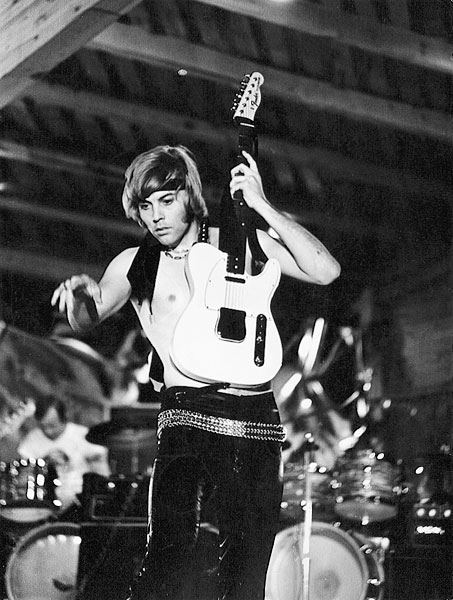 Suomalaislaulaja Danny esiintymässä Super Danny -kiertueella heinäkuussa 1969.